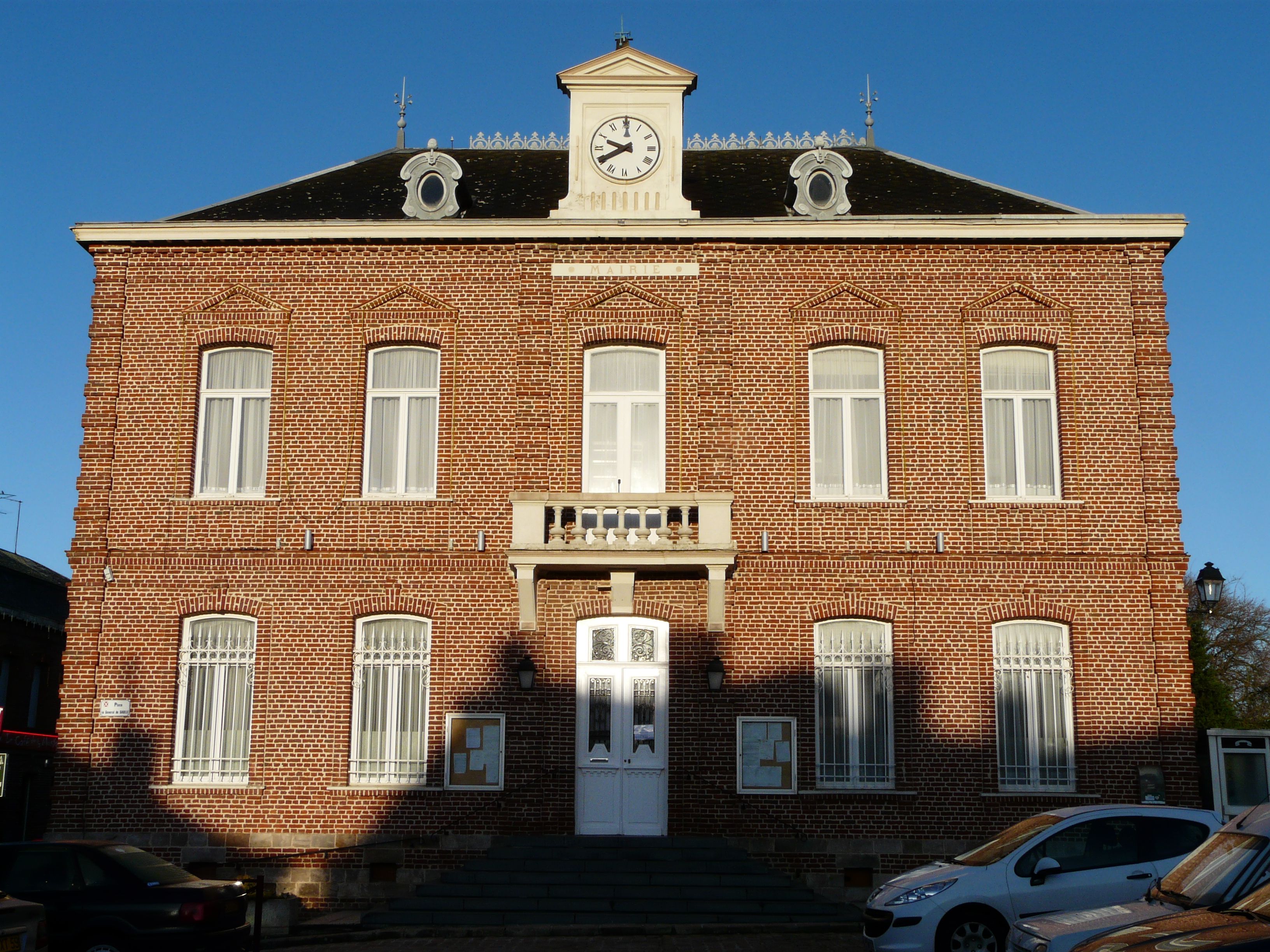 La mairie de Carnières (Nord)